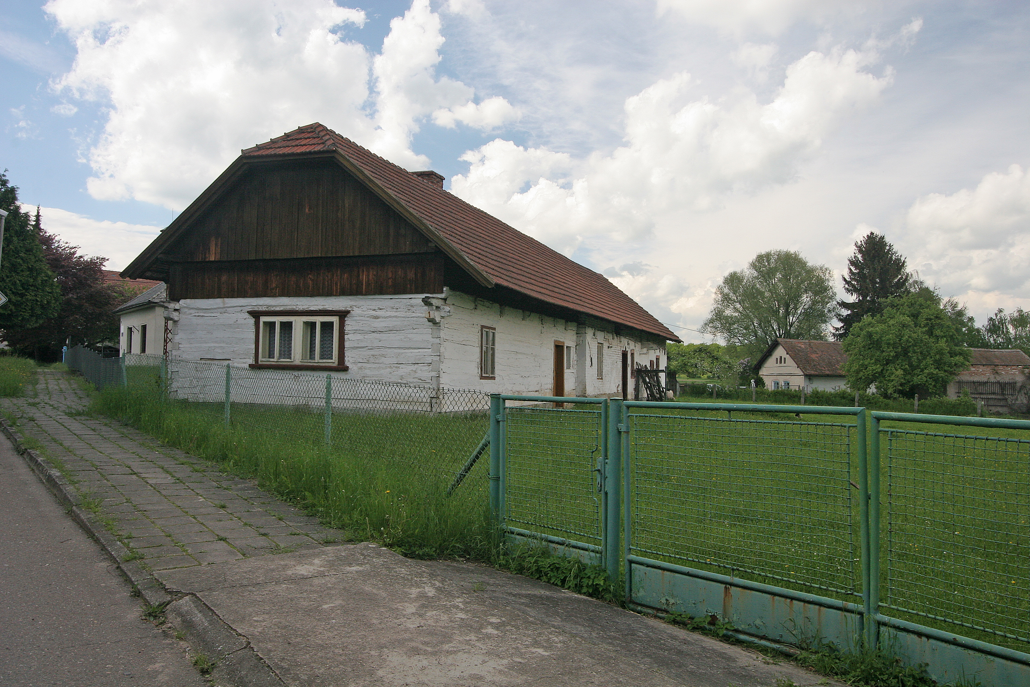 Luková čp. 1